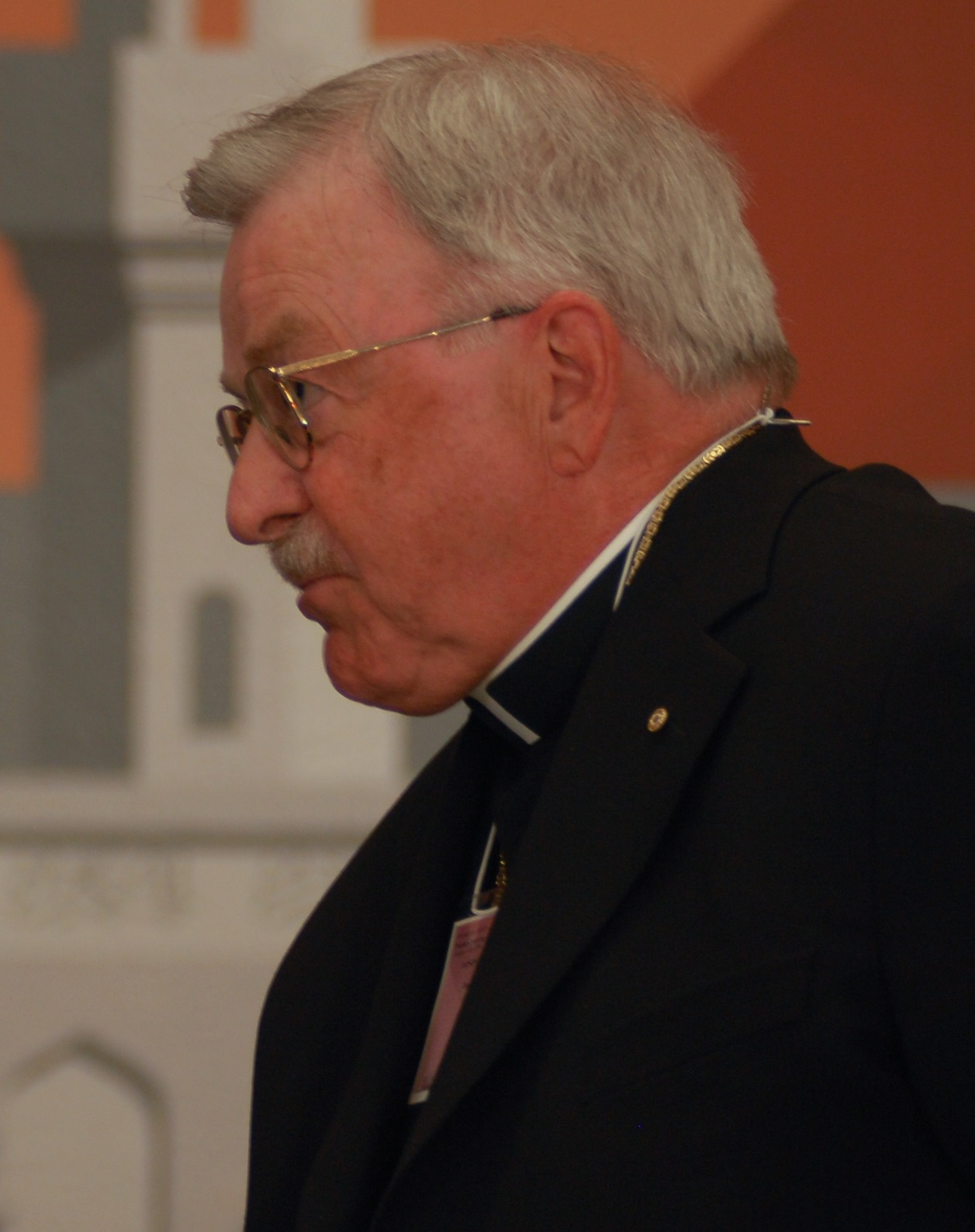 Bishop Fred Henry shakes hands with His Holiness Mirza Masroor Ahmad at the opening inauguration of the Baitan Nur Mosque, considered the largest mosque in Canada.